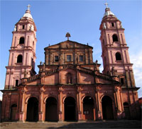 Santo Ângelo